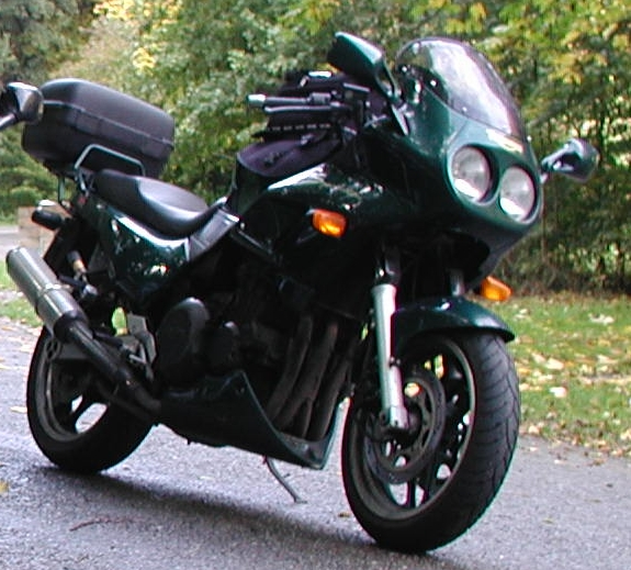 Ursprünglich Gruppenbild dreier Triumph Sprint Motorräder. Daraus Ausschnittvergrößerung einer Triumph Sprint 900